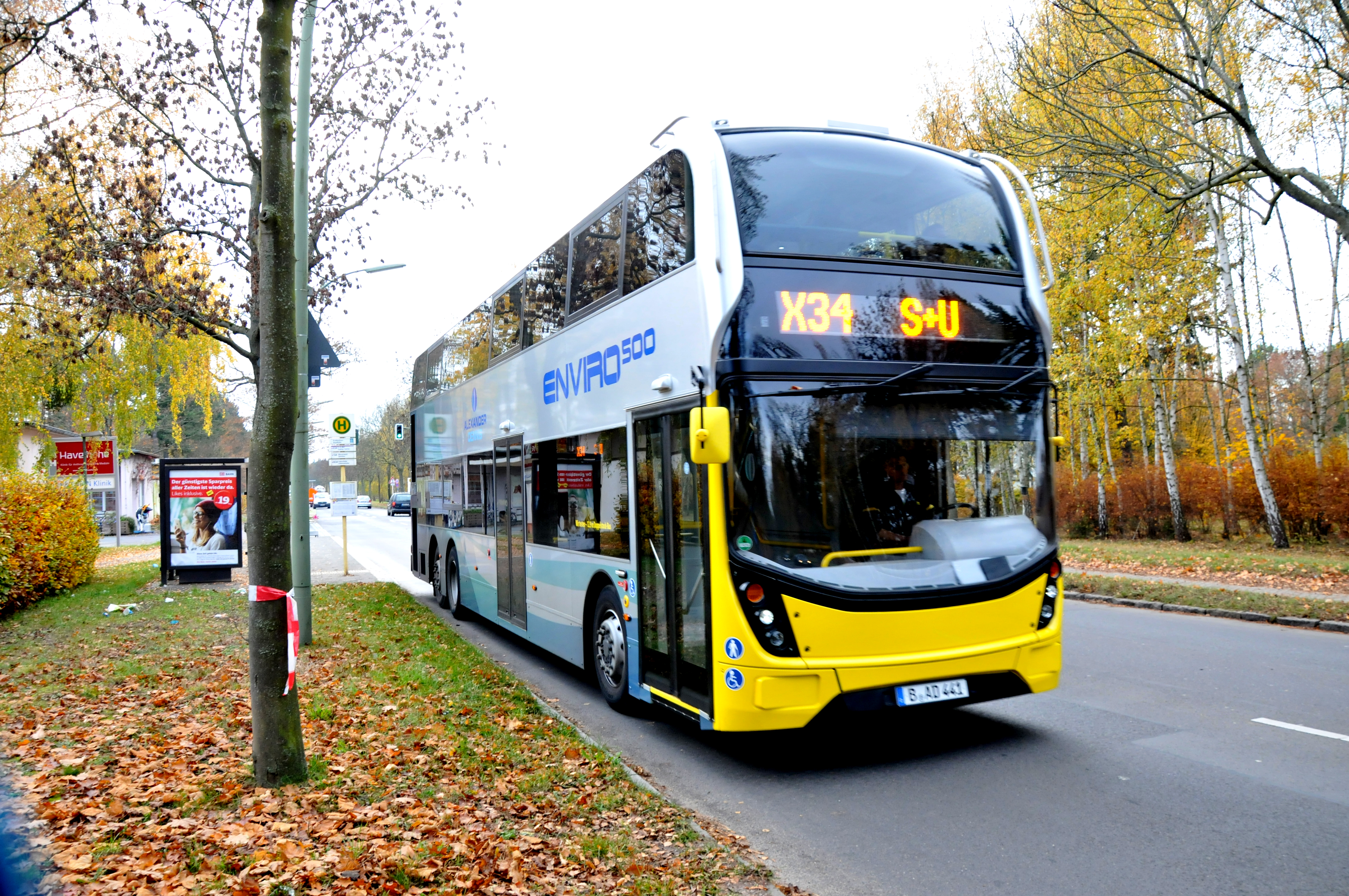 Berliner Verkehrsbetriebe (BVG) bus 441 van het type Alexander Dennis Enviro 500 als lijn X34 bij Krankenhaus Havelhöhe te Berlijn.